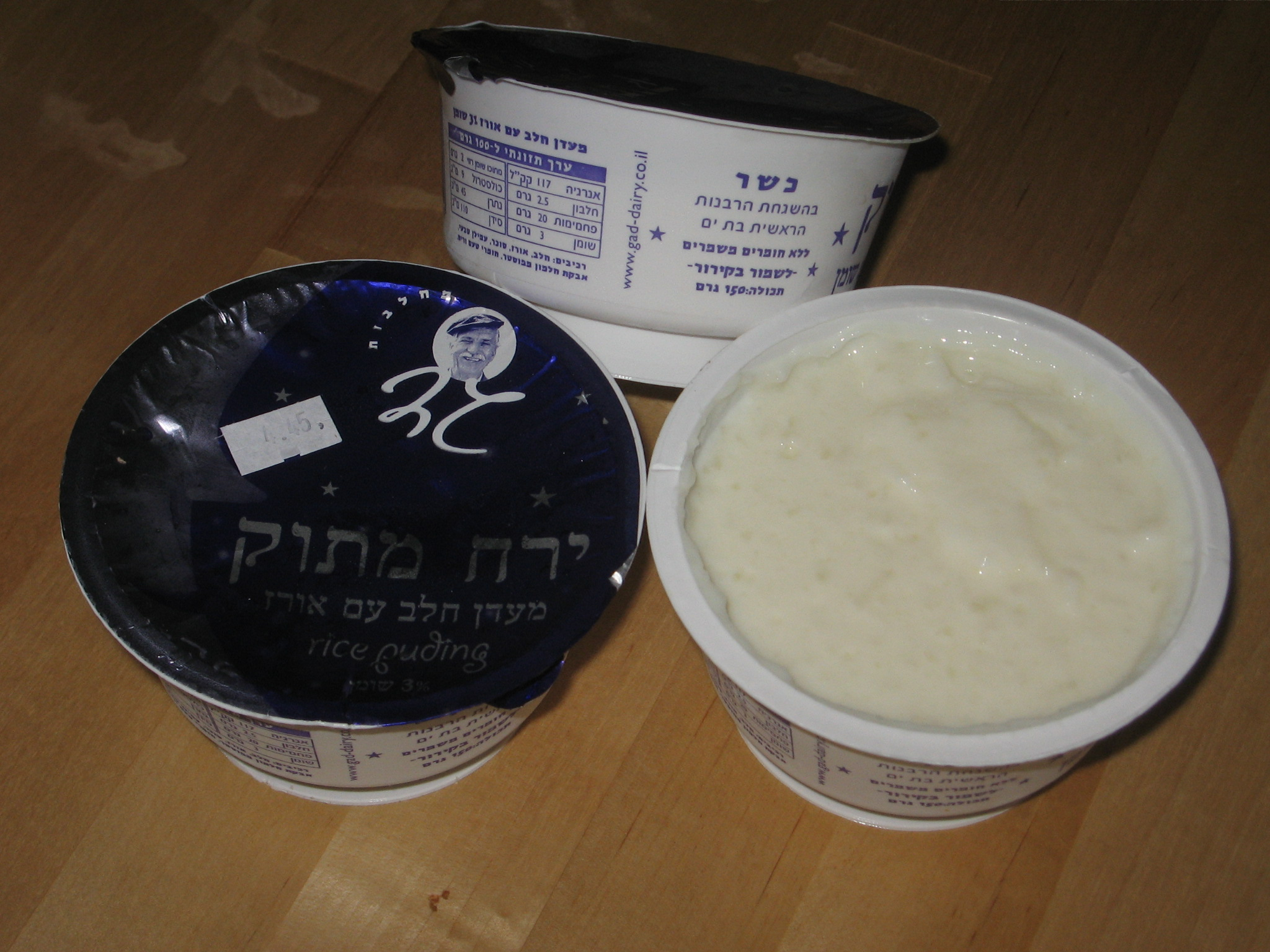 Israeli rice pudding